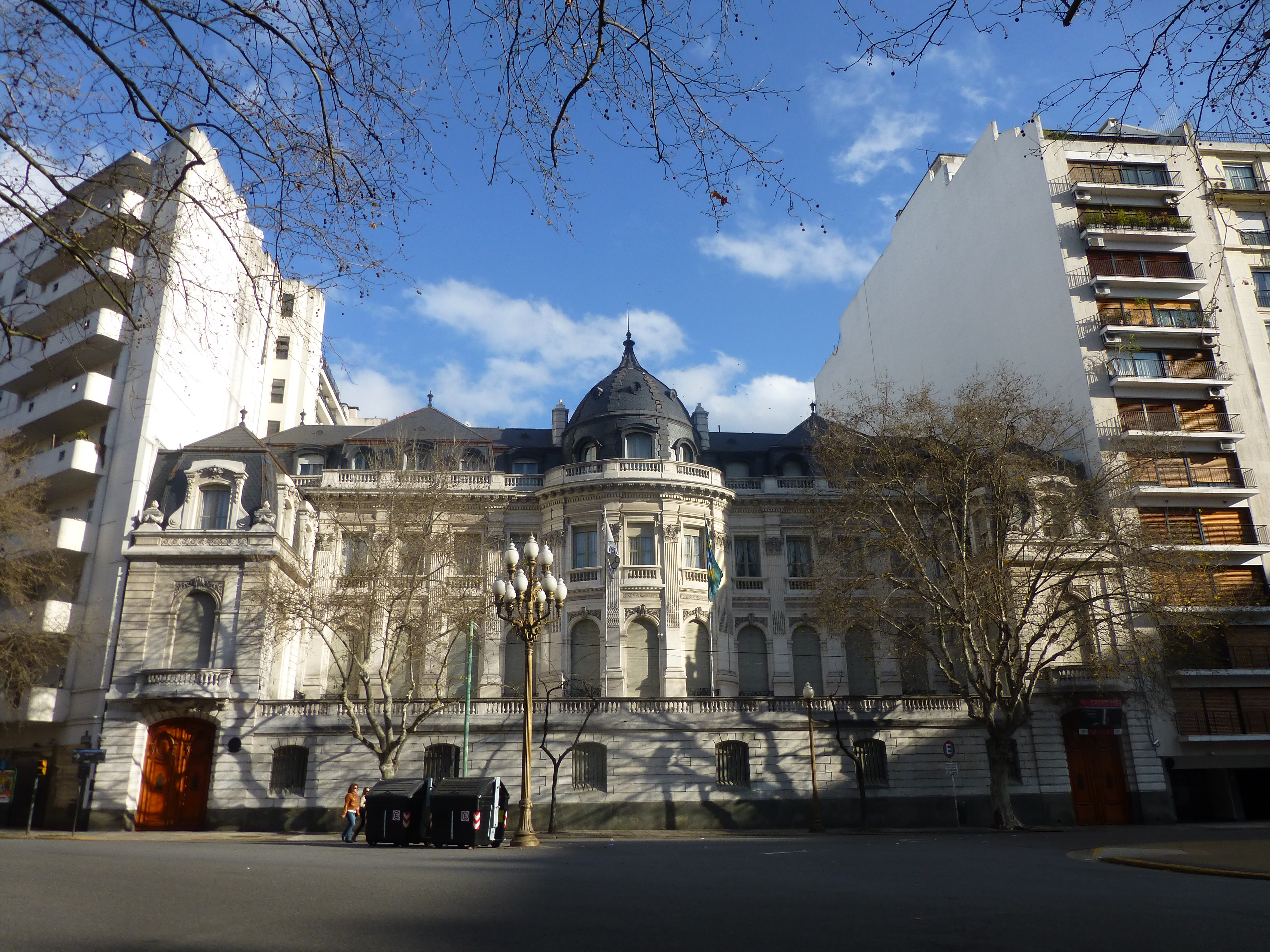 Residencias Alzaga Unzué, Ortiz Basualdo (Embajada de Francia), Atucha, Palacio Pereda y Plazoleta Carlos Pellegrini